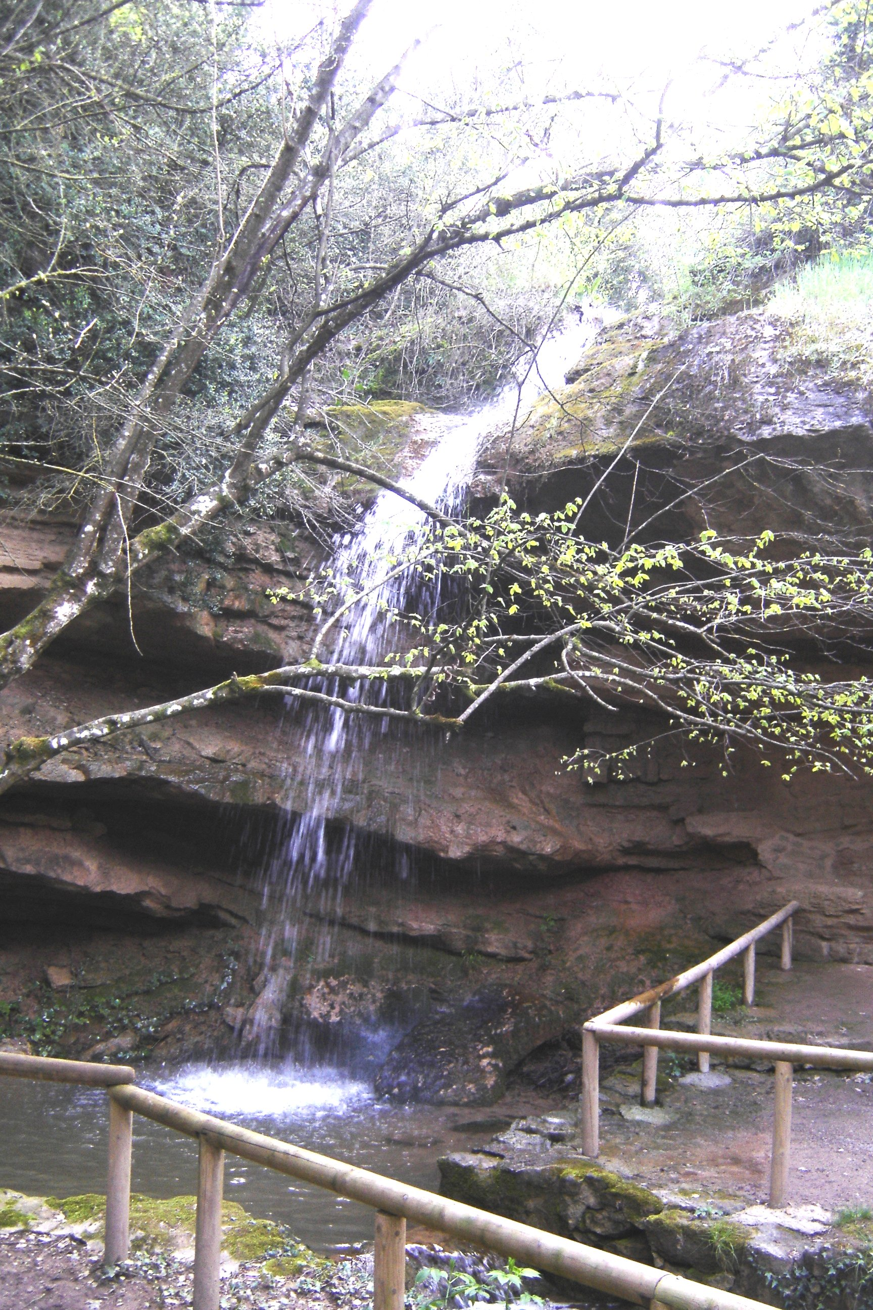 La rasa de Masnou (Solsonès) a la cascada de la font de la Mina